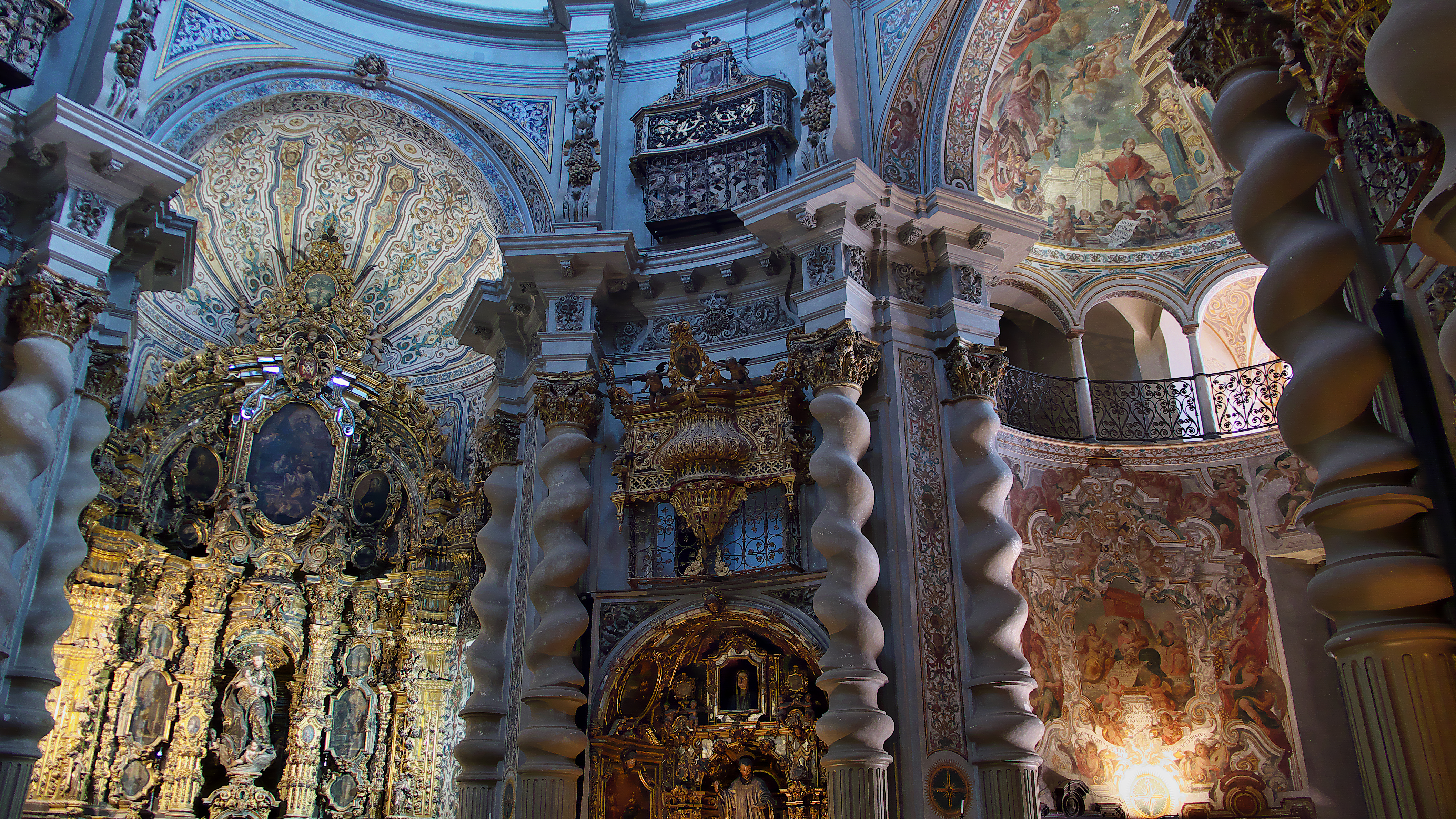 Iglesia de San Luis de los Franceses, Sevilla. Lucas Valdés, Domingo Martínez y Duque Cornejo, principalmente, ejecutaran el simbolismo adecuado a la formación de los futuros sacerdotes jesuitas. En Sevilla a 14 de Agosto de 1699, siendo general de la Compañía de Jesús, Tirso González de Santalla (†1705).